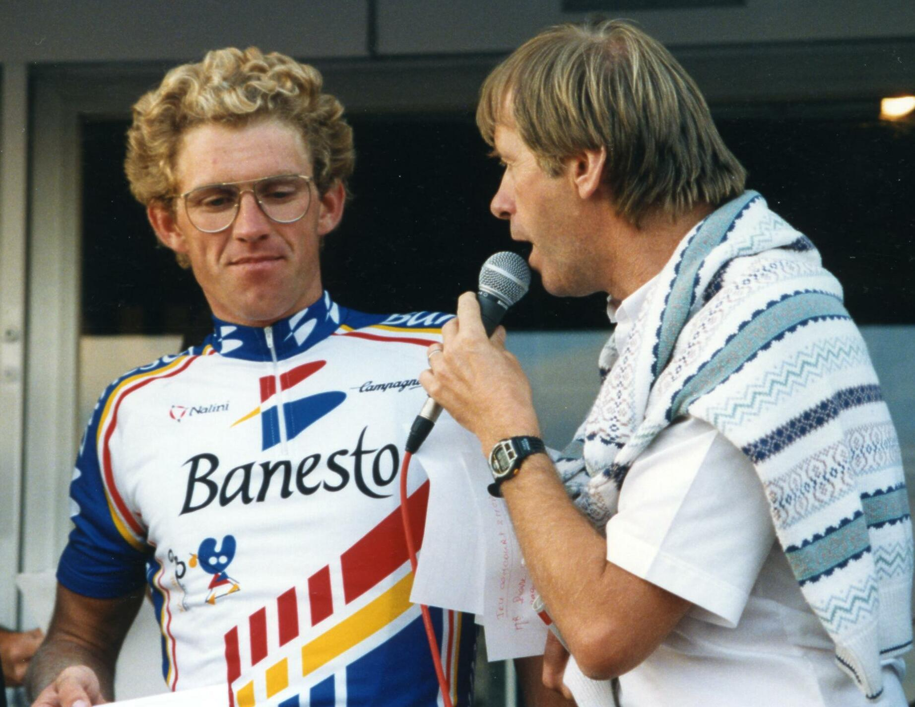 CRITERIUM DE LEVES